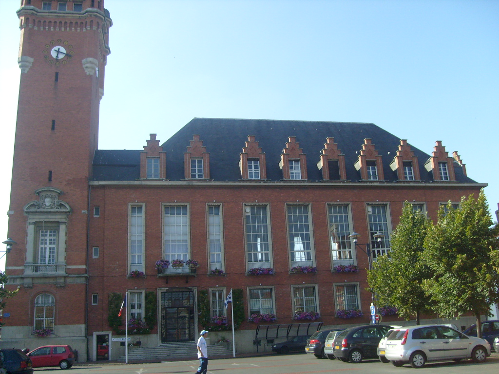 Hotel de Ville de Rosendaël(Dunkerque)